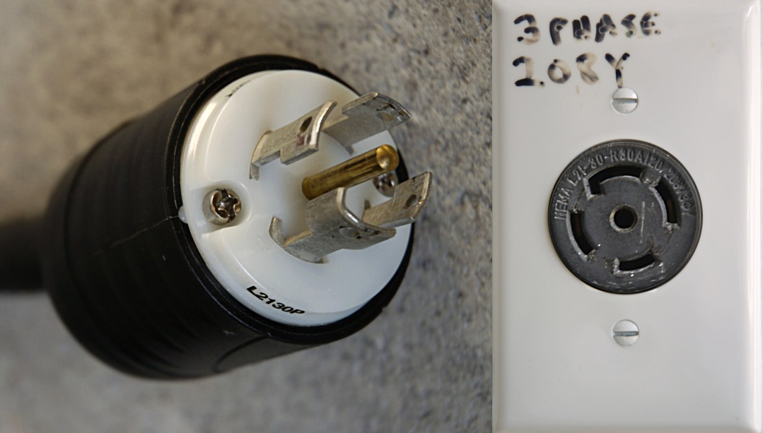 L21-30 plug and receptacle